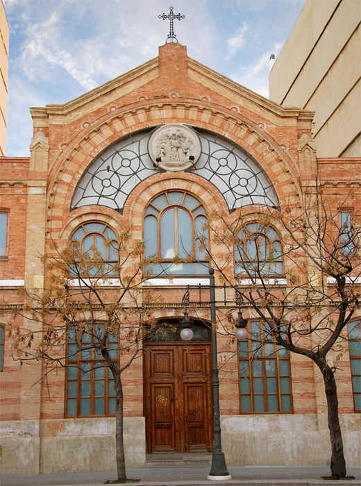 Salón de Racionistas, Valencia, Spain.